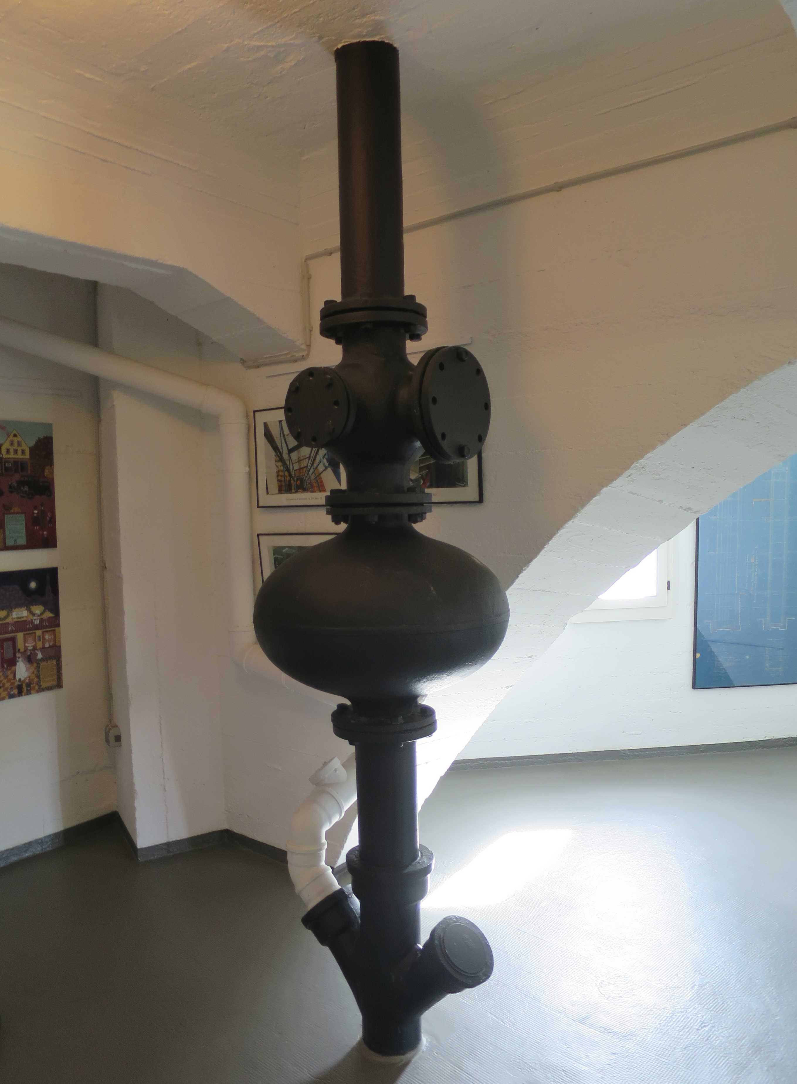 Zentrale Rohrleitung im ehemaligen Wasserturm von Mannheim Seckenheim